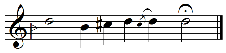 نمونه از فرود آواز اصفهان